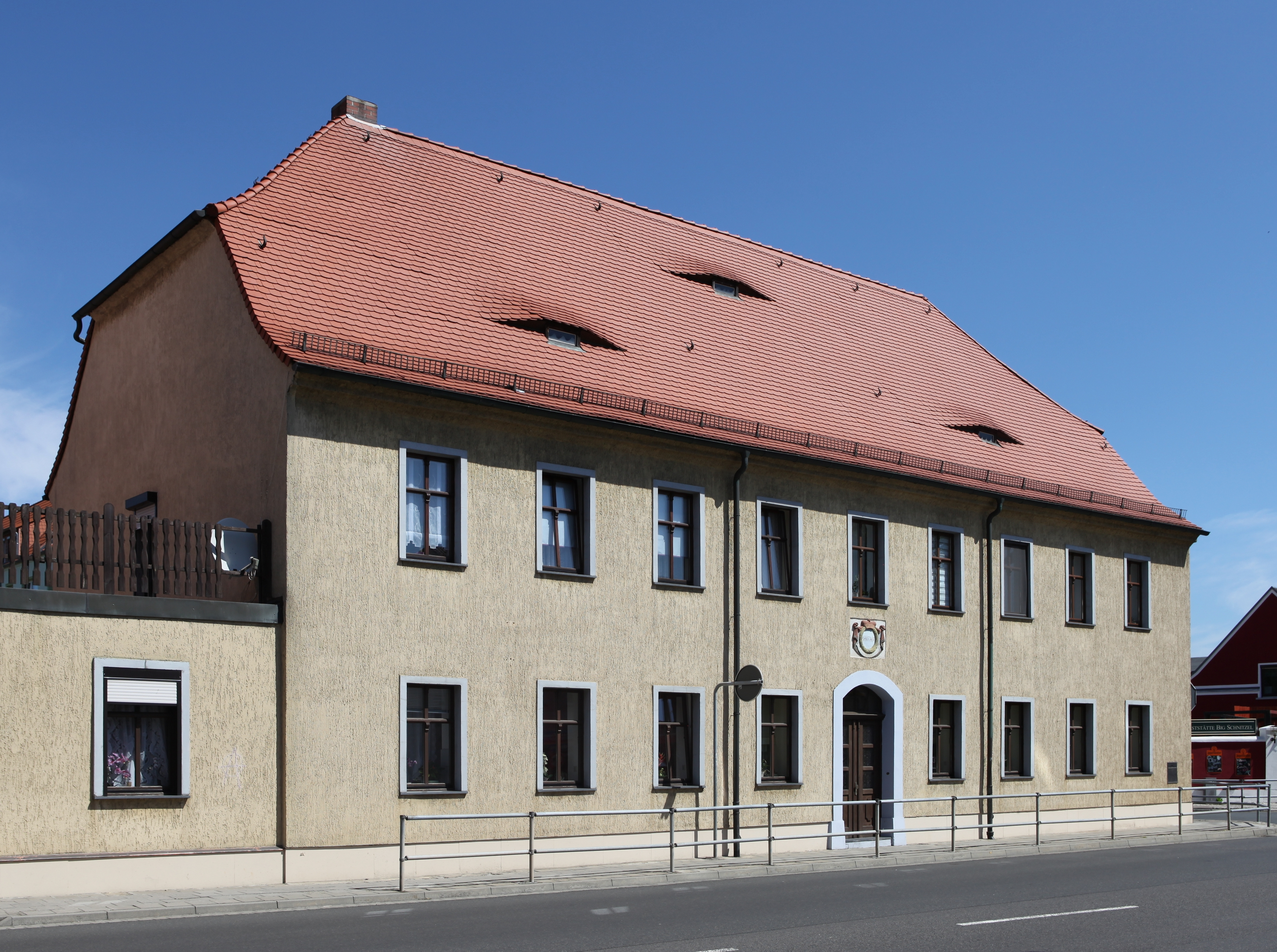 Kulturdenkmal Wohn- und Geschäftshaus Bergstraße 28 „Gasthof Zum Rautenkranz“ in Eilenburg; Objektnummer: 08973316